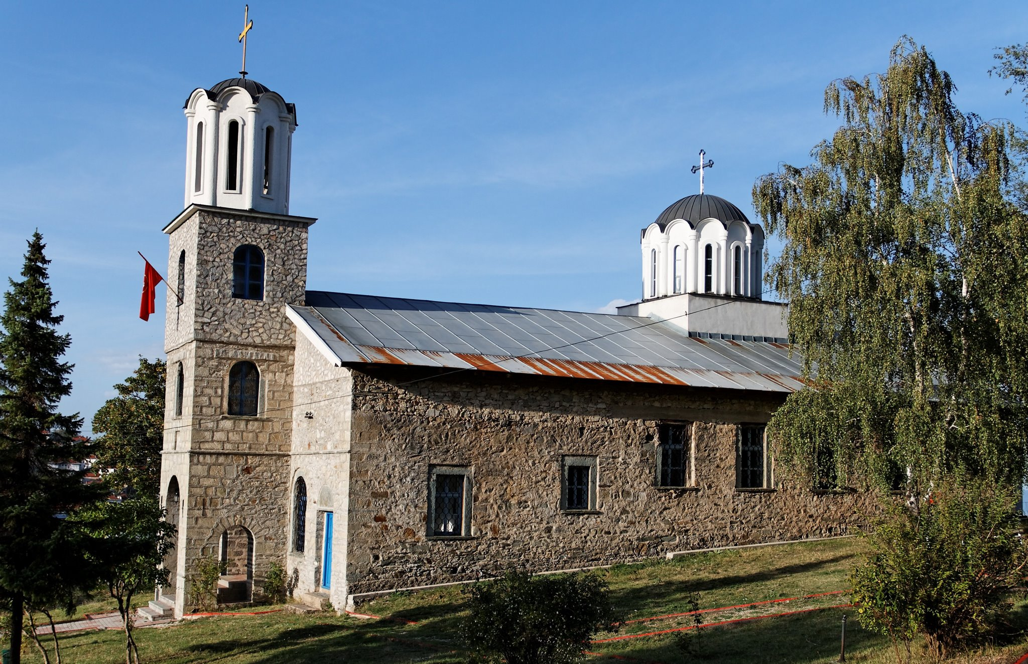 Sv.Trojstvo -- Krusevo